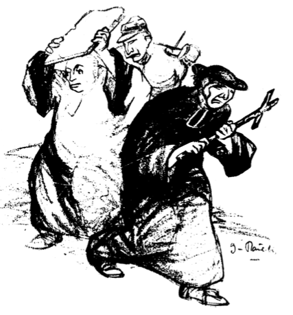 3 complices